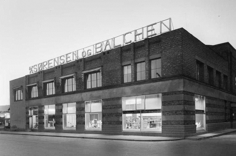 Sørensen & Balchen bilforretning.